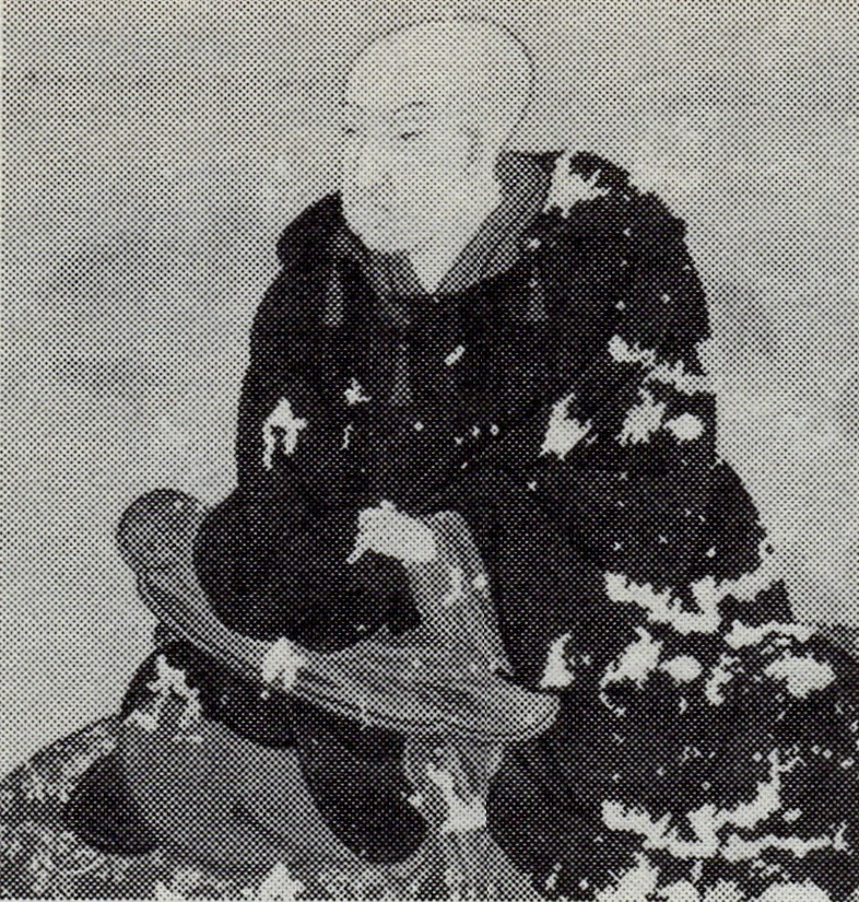 黒田直韶の肖像(モノクロ)。